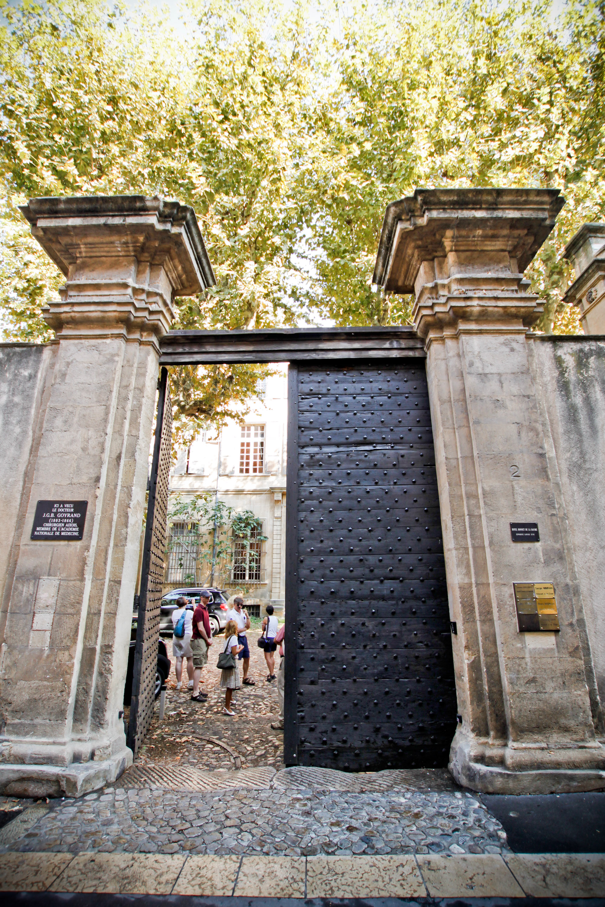 Le portail de l'hôtel Bonnet de la Baume, 2 rue Goyrand, Aix-en-Provence (France). Texte de la plaque de gauche : "Ici a vécu le docteur J.G.B. Goyrand (1803-1866) chirurgien aixois membre de l'Académie nationale de médecine" Texte de la plaque de droite : "Hôtel bonnet de la Baume époque Louis XVI"